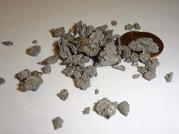 Titamschwamm, wie er bei der Herstellung nach dem Kroll-Prozess anfällt.